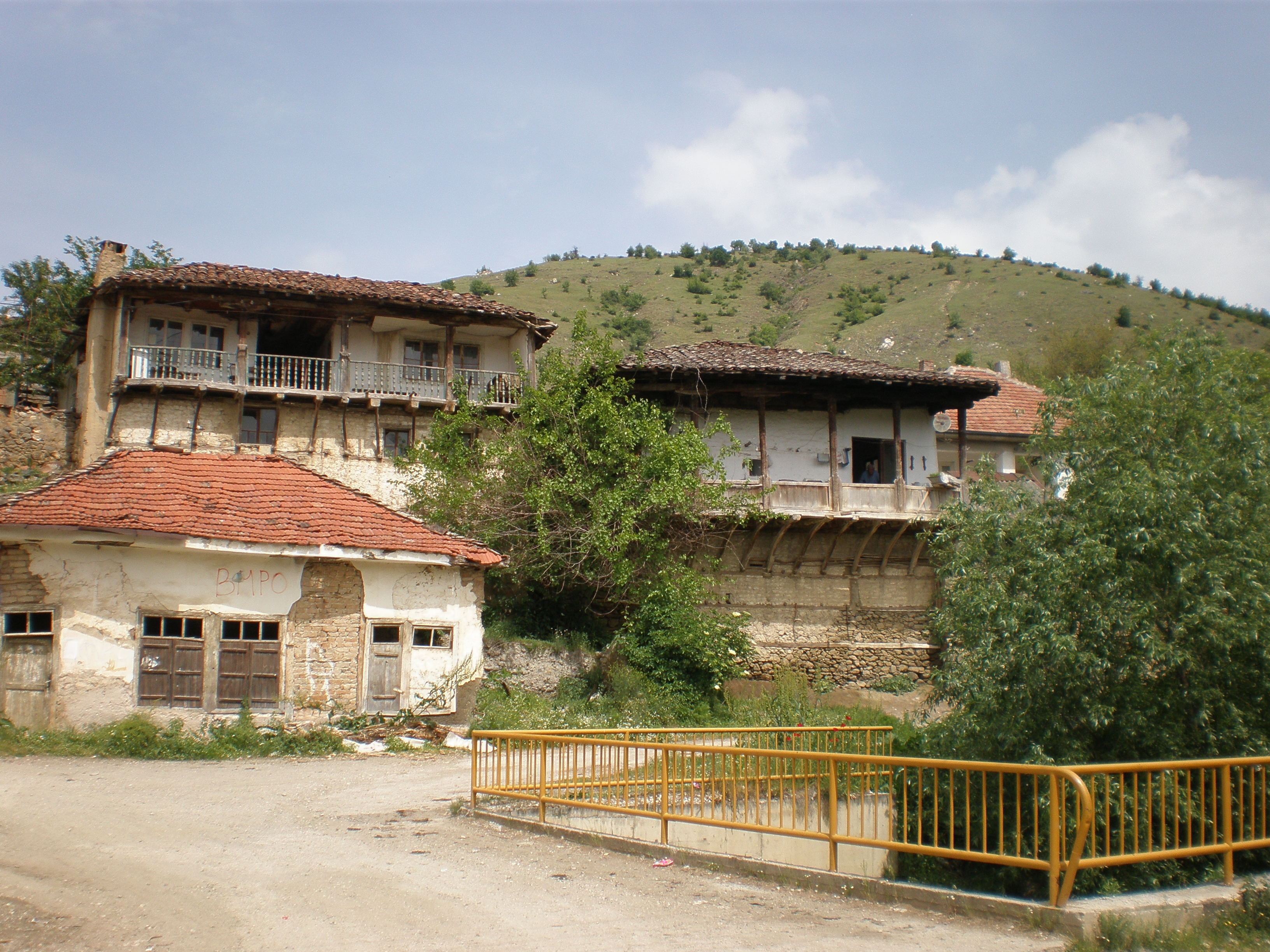 Ljubanci, Macedonia